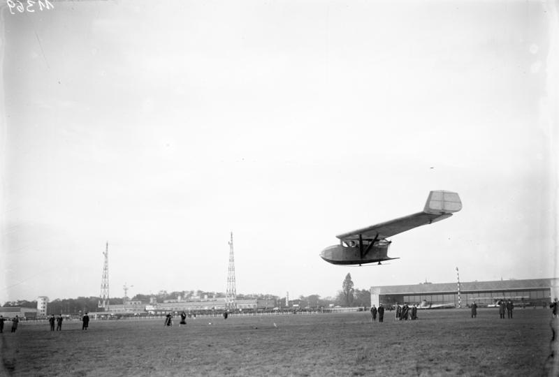 Interessante Versuche mit einem schwanzlosen Flugzeug! Das schwanzlose Flugzeug mit dem Piloten Groenhoff am Steuer bei einem gelungenen Flug auf dem Tempelhofer Feld. Das Flugzeug ist mit einem 8 P.S. D.-K.-W-Motor, welcher hinten liegt, ausgerüstet. Information added by Wikimedia users.Lippisch Storch V motor glider, probably in 1929